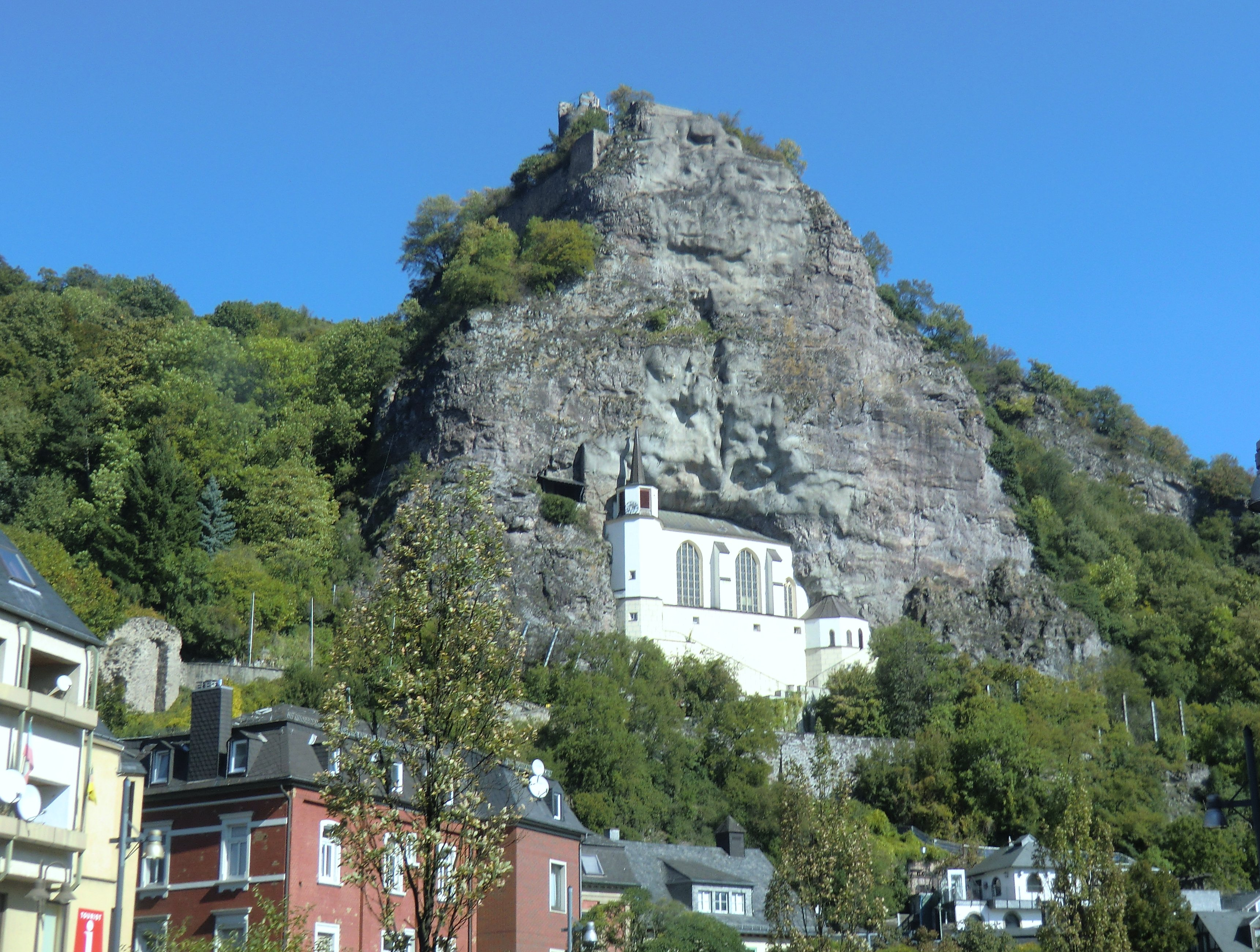 Die Felsenkirche in Idar-ObersteinThis is a photograph of an architectural monument.